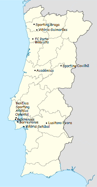 Carta dos clubes participantes do campeonato de portugal de futebol de primeira divisao 1953-1954